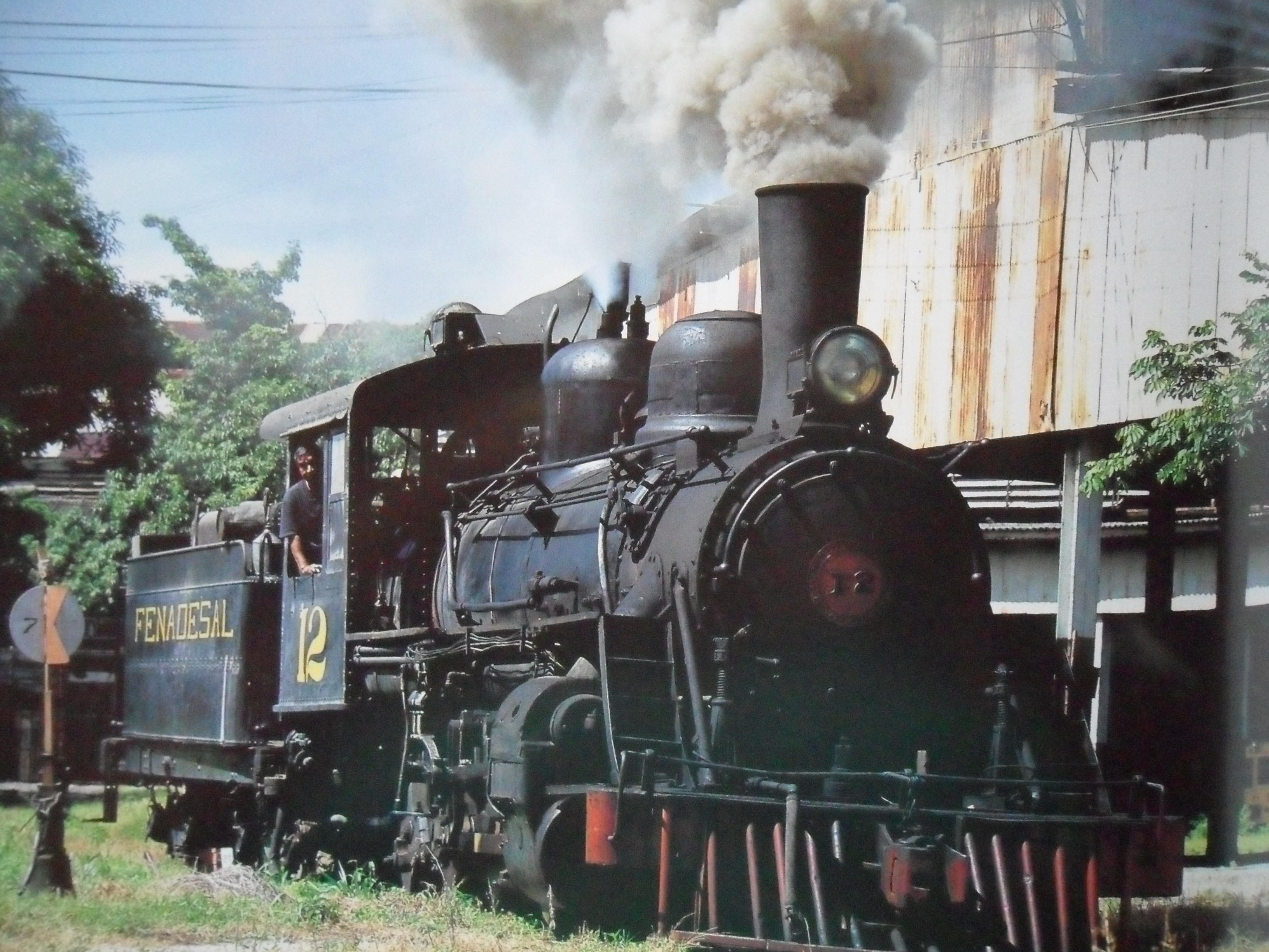 Imagen del tren de Apopa (municipio de San Salvador. El Salvador. CA)